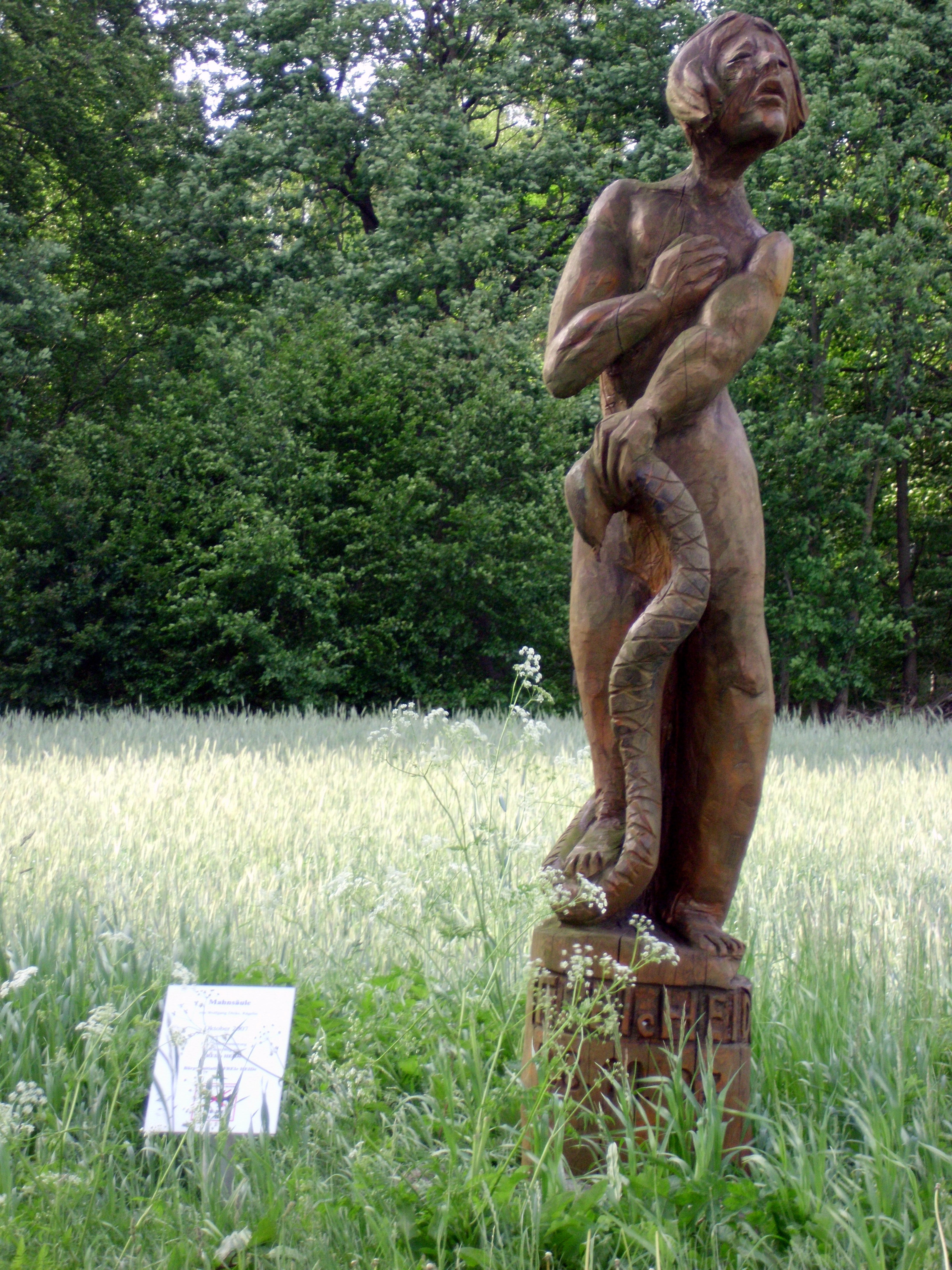 Mahnsäule "Freie Heide" auf dem ehemaligen Truppenübungsplatz Wittstock/Dosse ("Bombodrom") in der Kyritz-Ruppiner Heide im Norden des Landes Brandenburg, aufgestellt am 28. Oktober 2007 auf der 106. Protestwanderung mit 600 Teilnehmern von Flecken Zechlin zur Bombodromgrenze